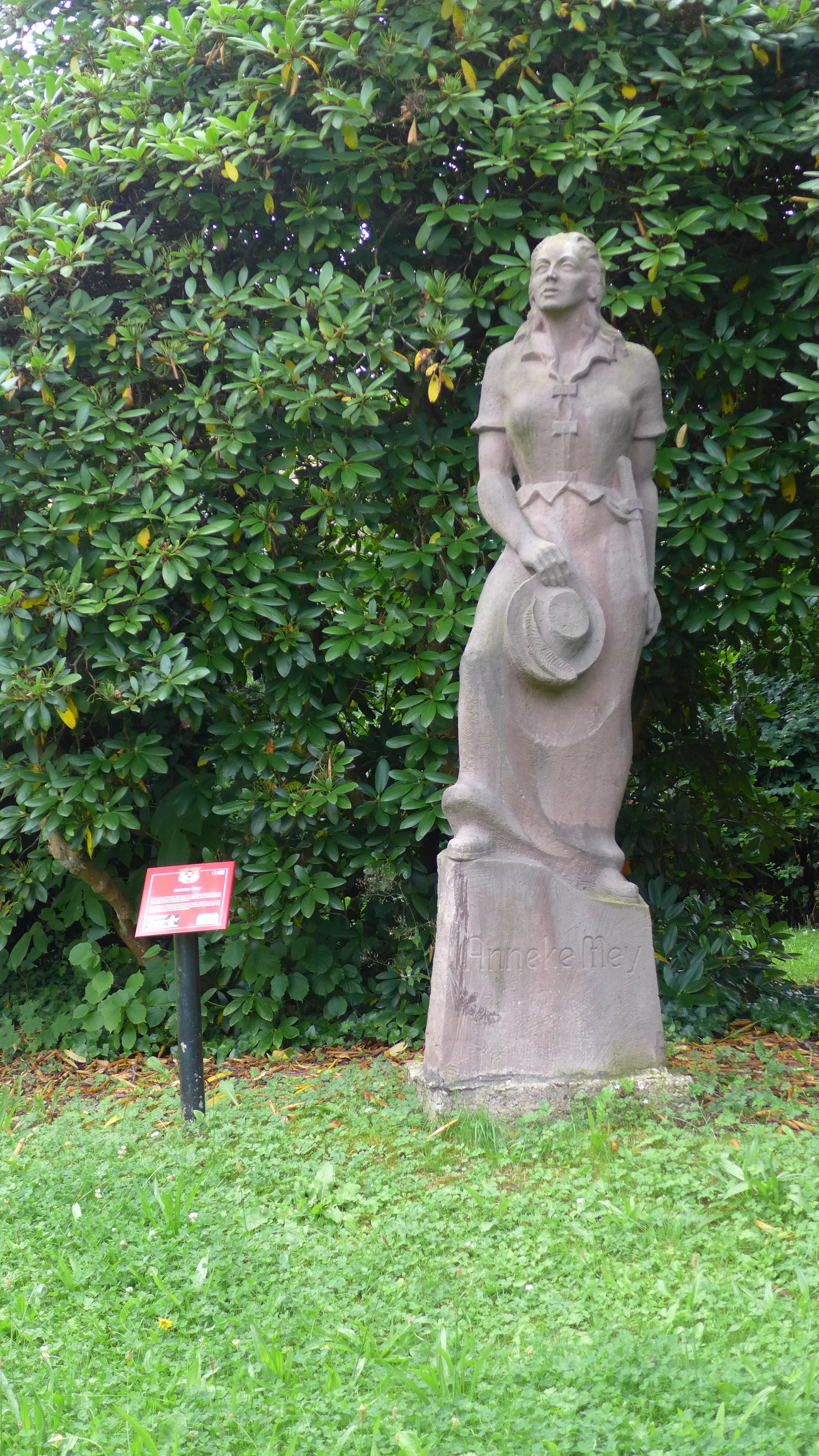 Ein Werk des Stadtoldendorfer Bildhauers Walter Lüchow aus dem Jahr 1955